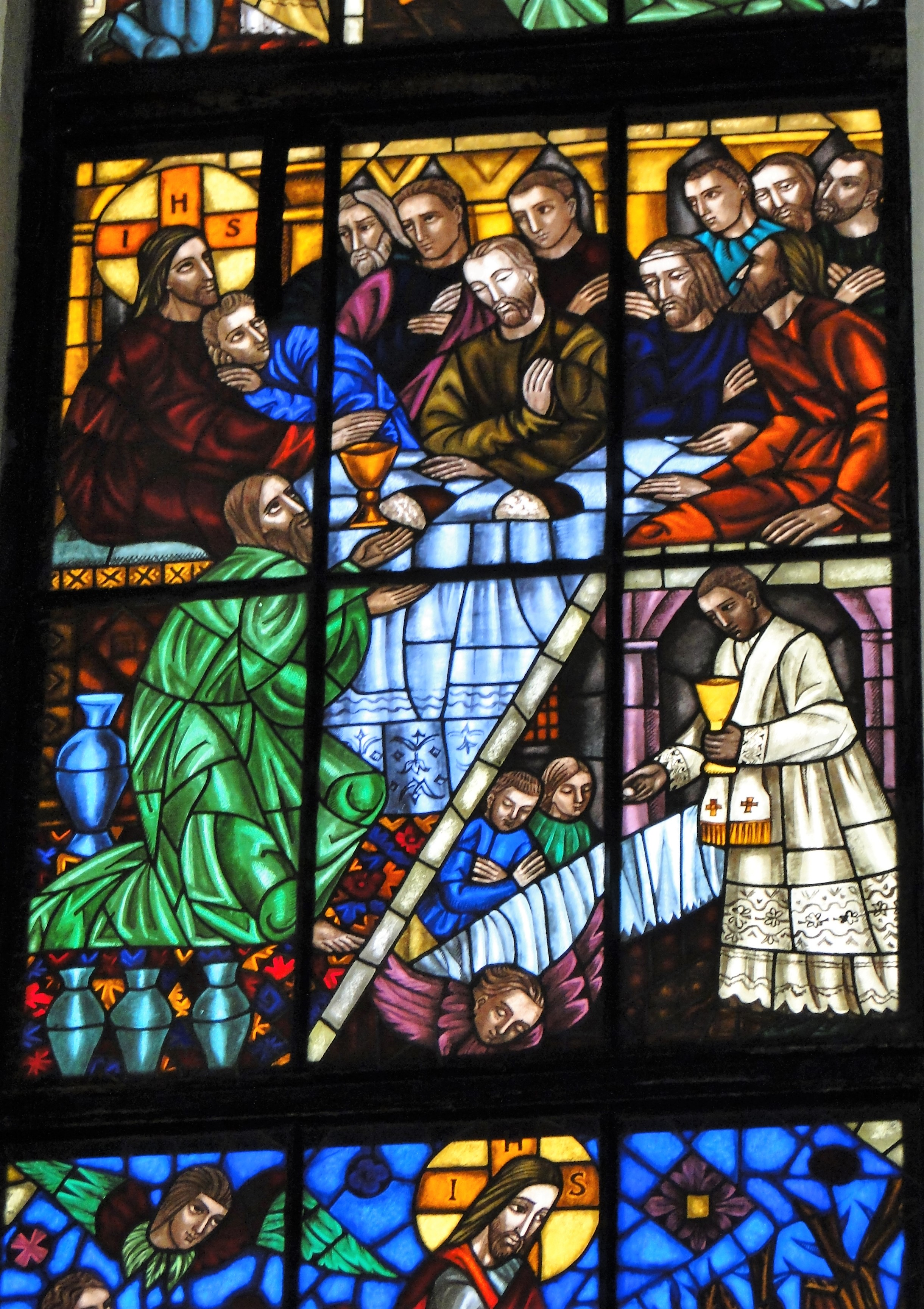 Kwatera witraża z kościoła pw. św. Antoniego w Częstochowa przedstawiająca "Ostatnią wieczerzę" i "Eucharystię", zaprojektowana przez Zofię Baudouin de Courtenay, wykonana pomiędzy 1959-1965 przez Zakład Witrażowniczy Stefana Nawrockiego w Częstochowie